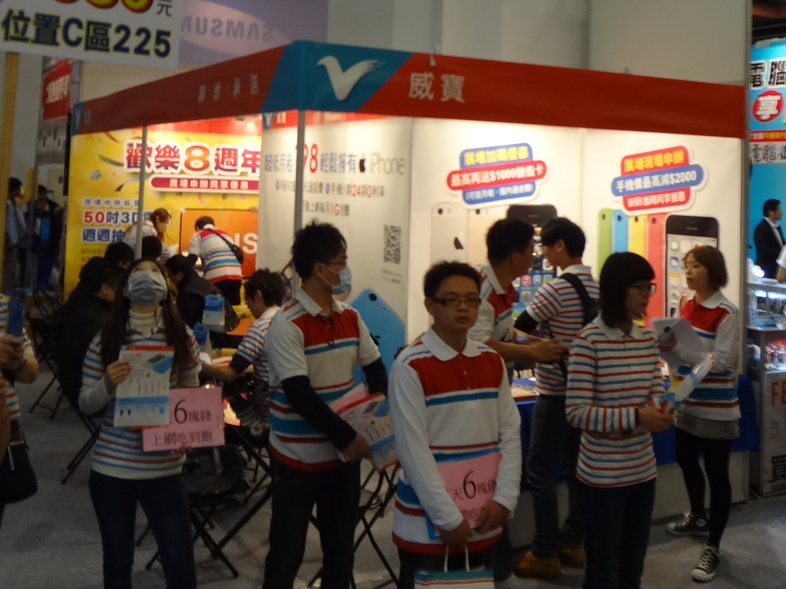 2013年資訊月的威寶電信攤位。